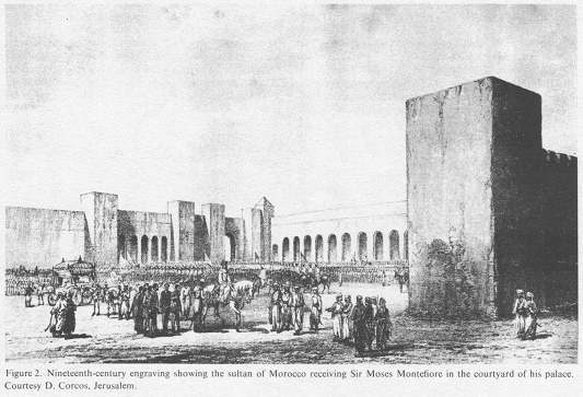 קבלת פנים ממלכתית לסר משה מונטיפיורי בעת ביקורו במרוקו בשנת 1864